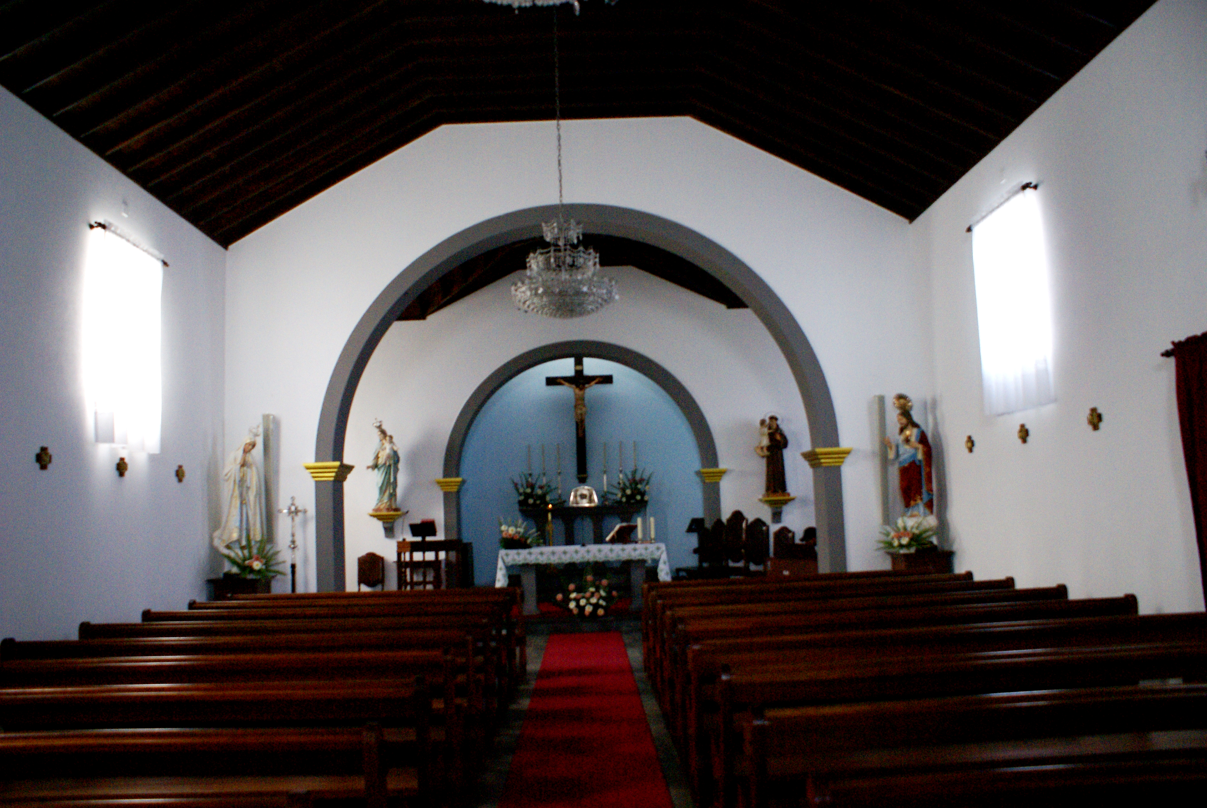 Central nave of the Church of Santo António, Velas, São Jorge (Azores), Portugal